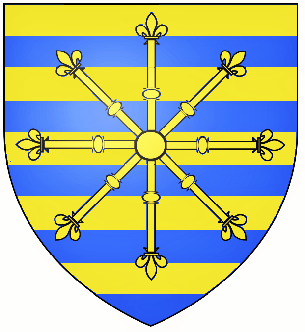 Abbaye de Saint-Evroult, Orne, Blason